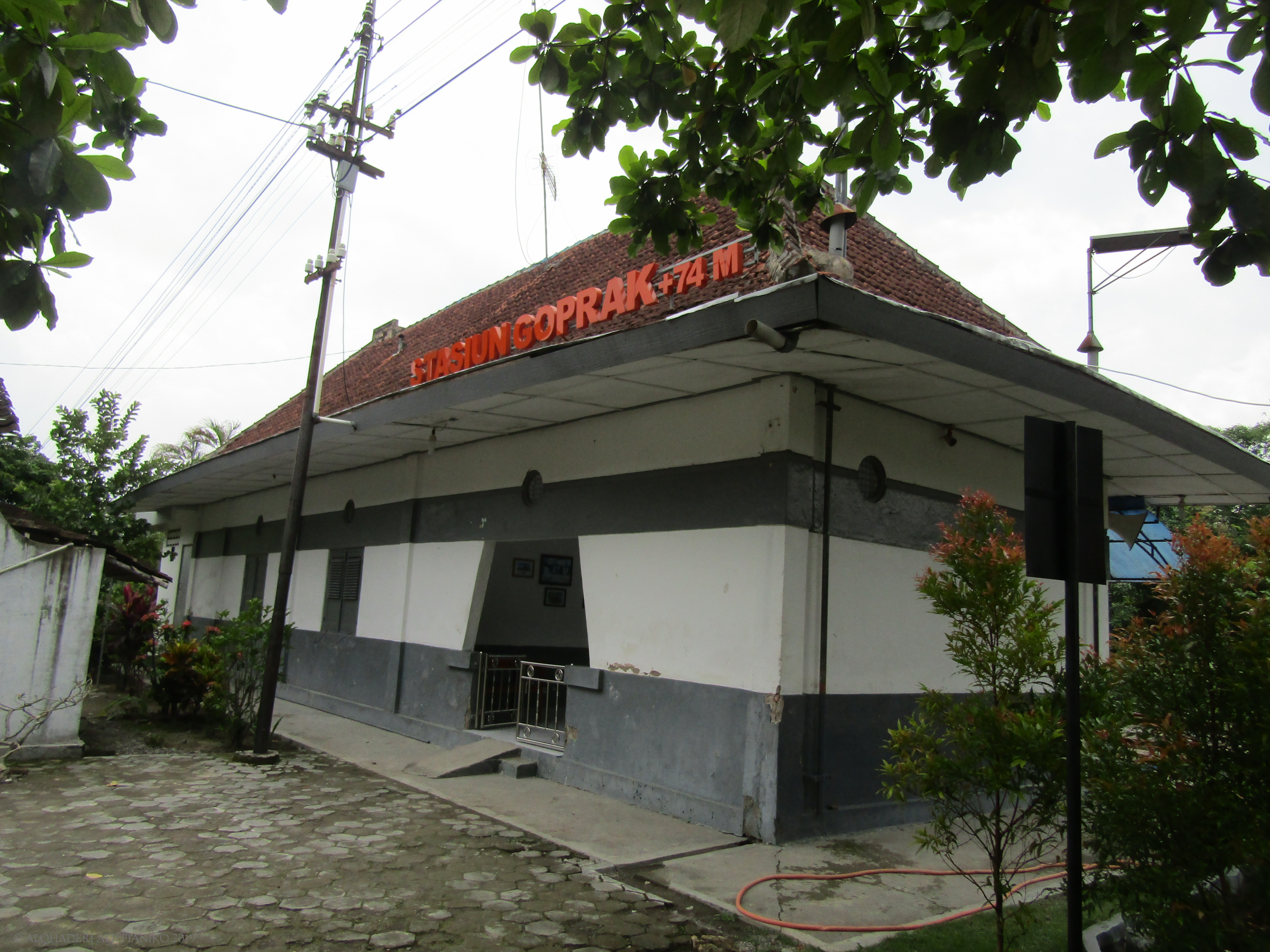 Tampak depan Stasiun Goprak, 2019